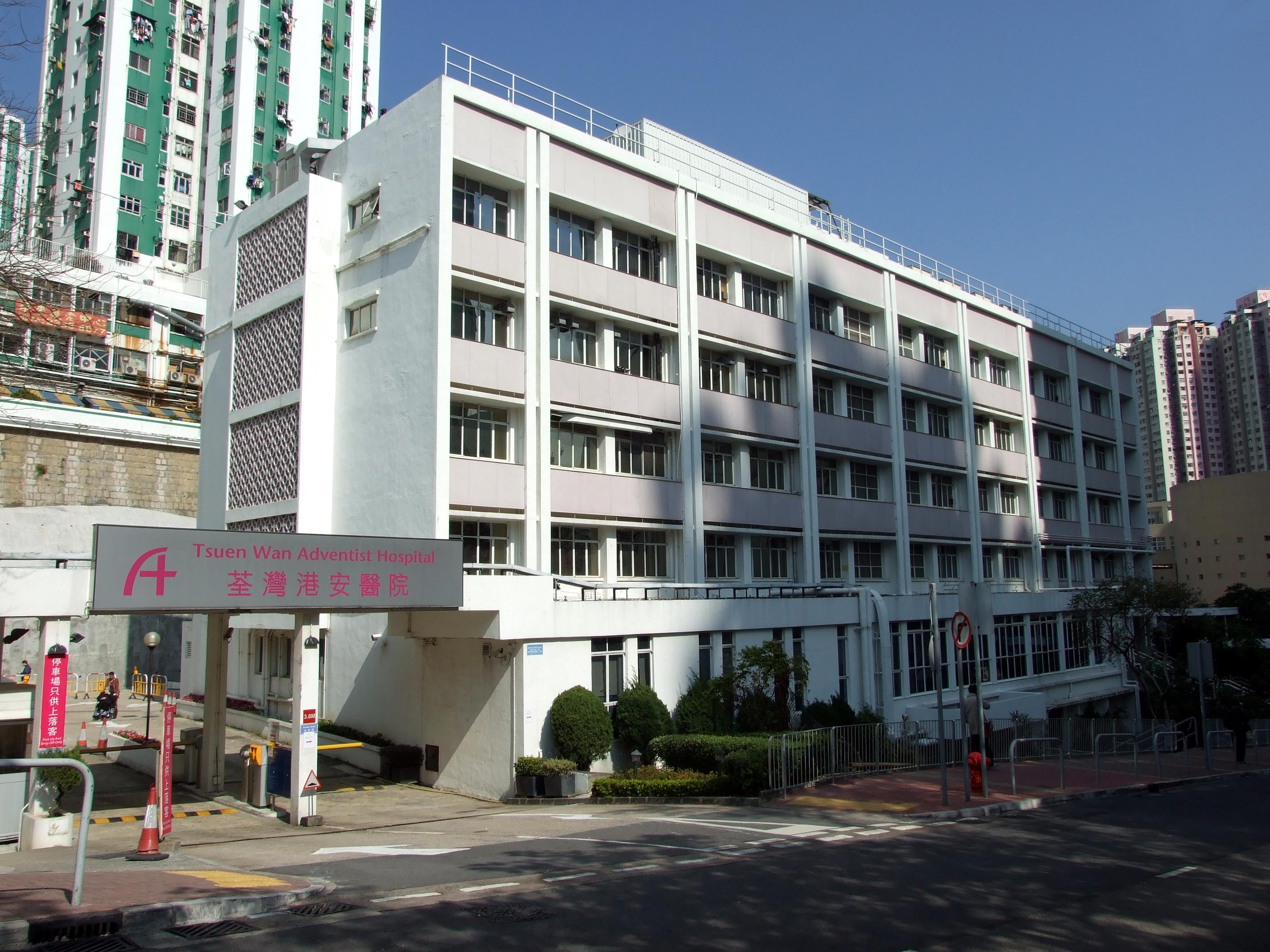 中文（香港）: 荃灣港安醫院